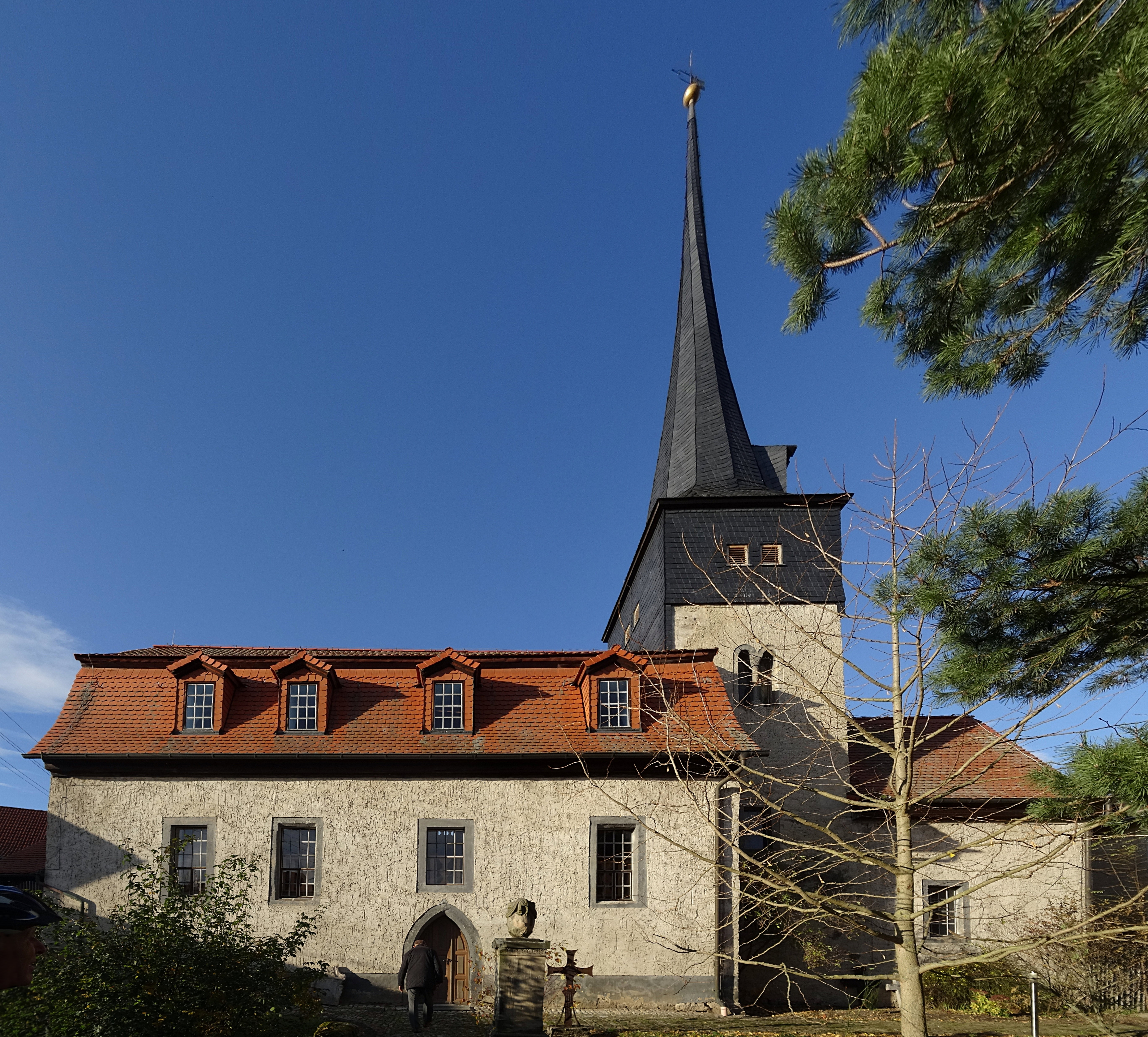 Dorfkirche St. Petrus in Sulzbach